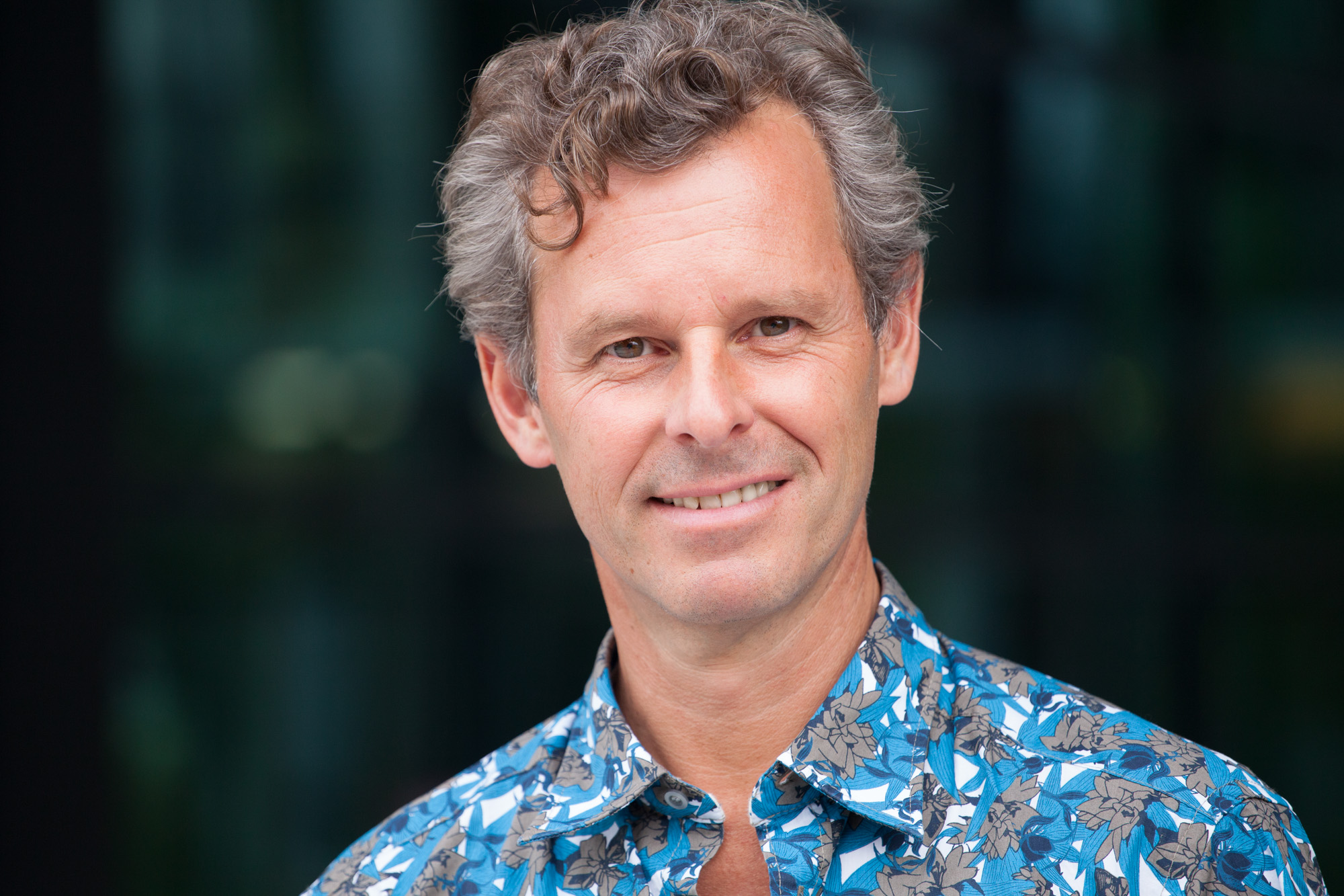 Coach, Trainer, Entertainer